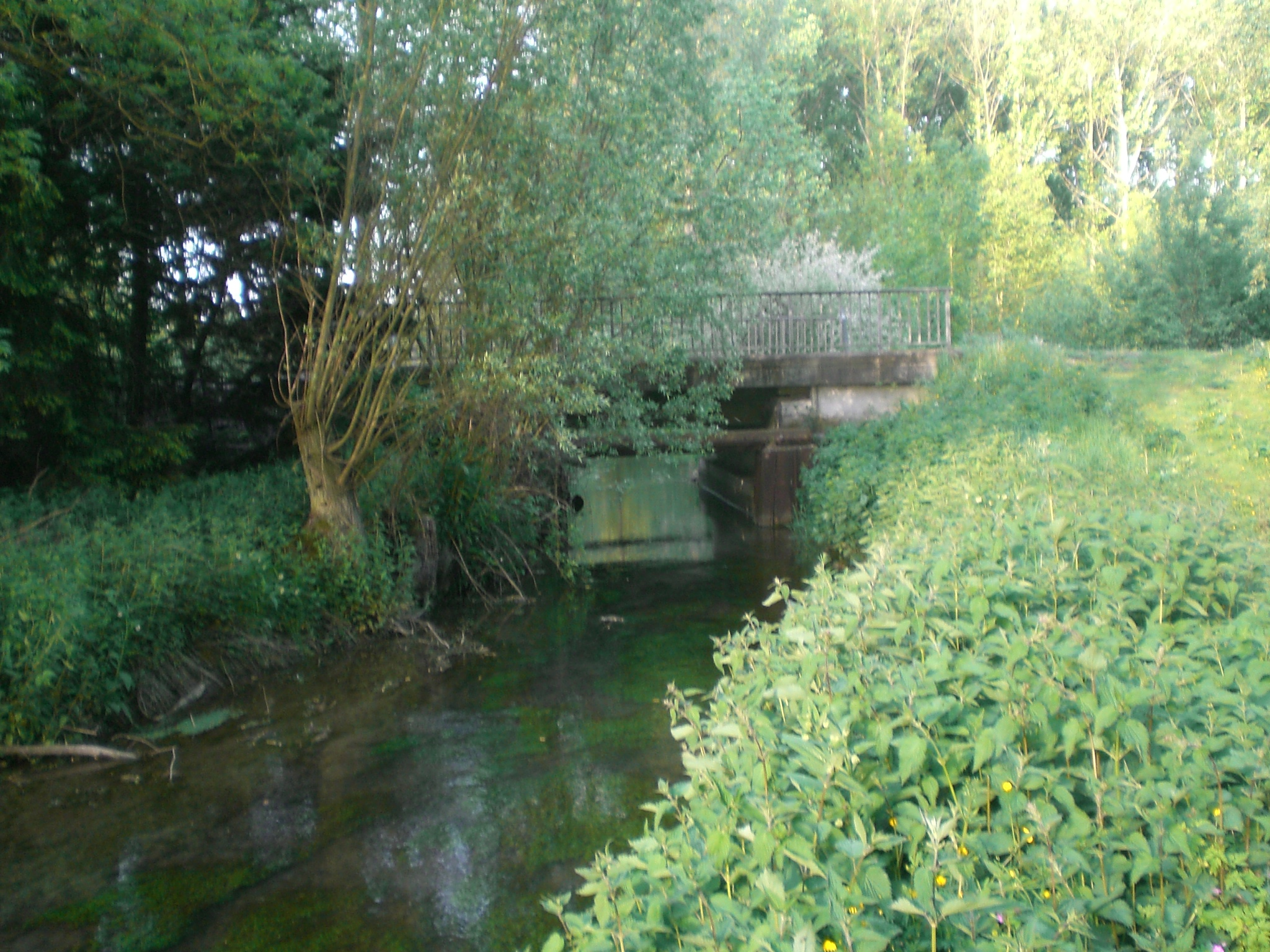 La Germaine à Sancourt en mai 2010